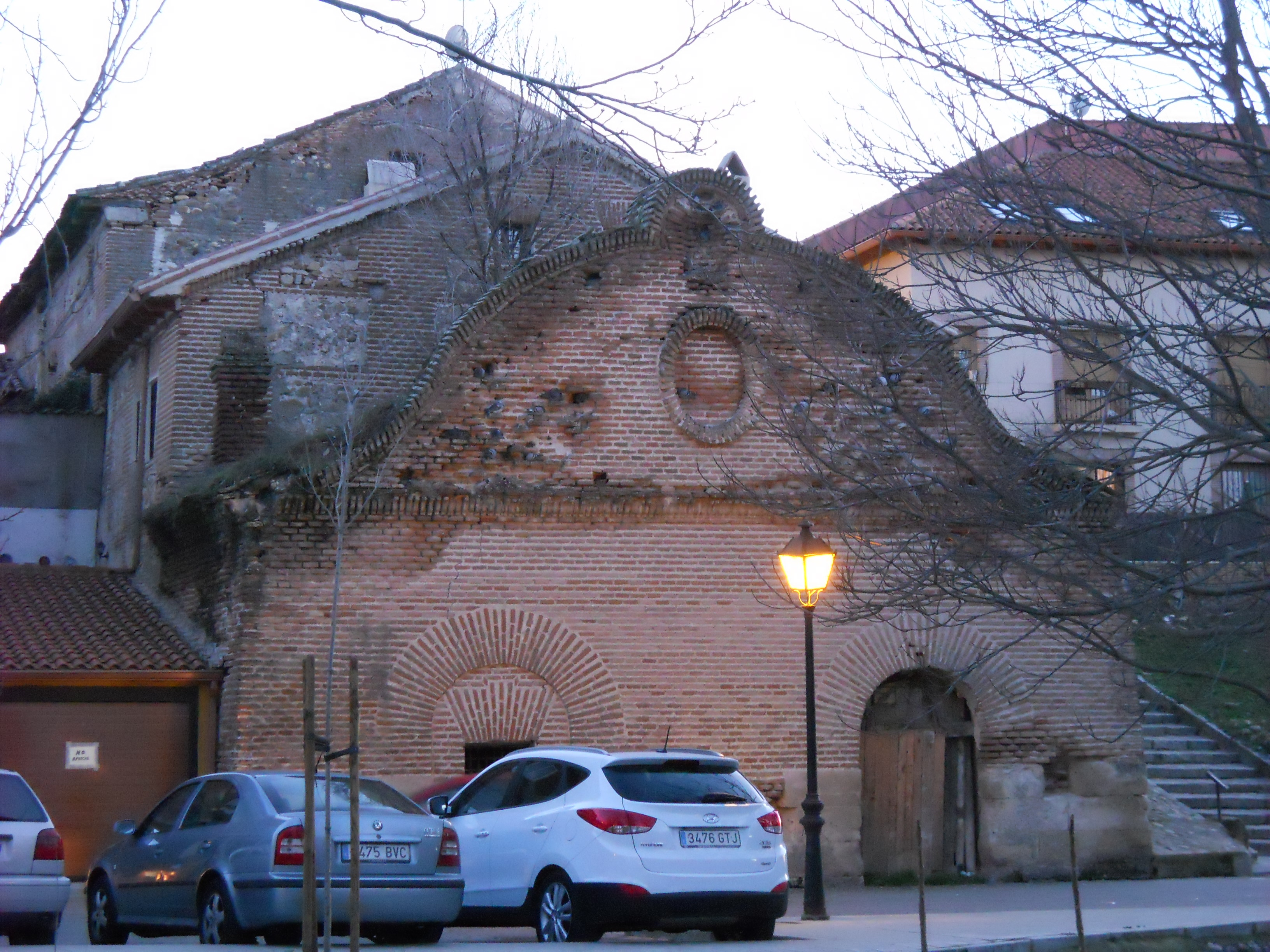 Bodega del Arrabal, Talamanca de Jarama, Madrid, España